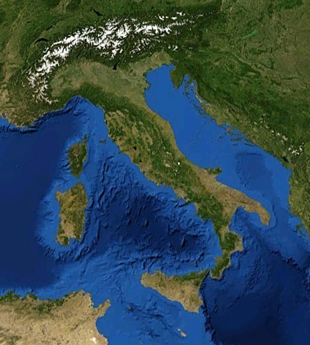 Carta fisica dei mari italiani